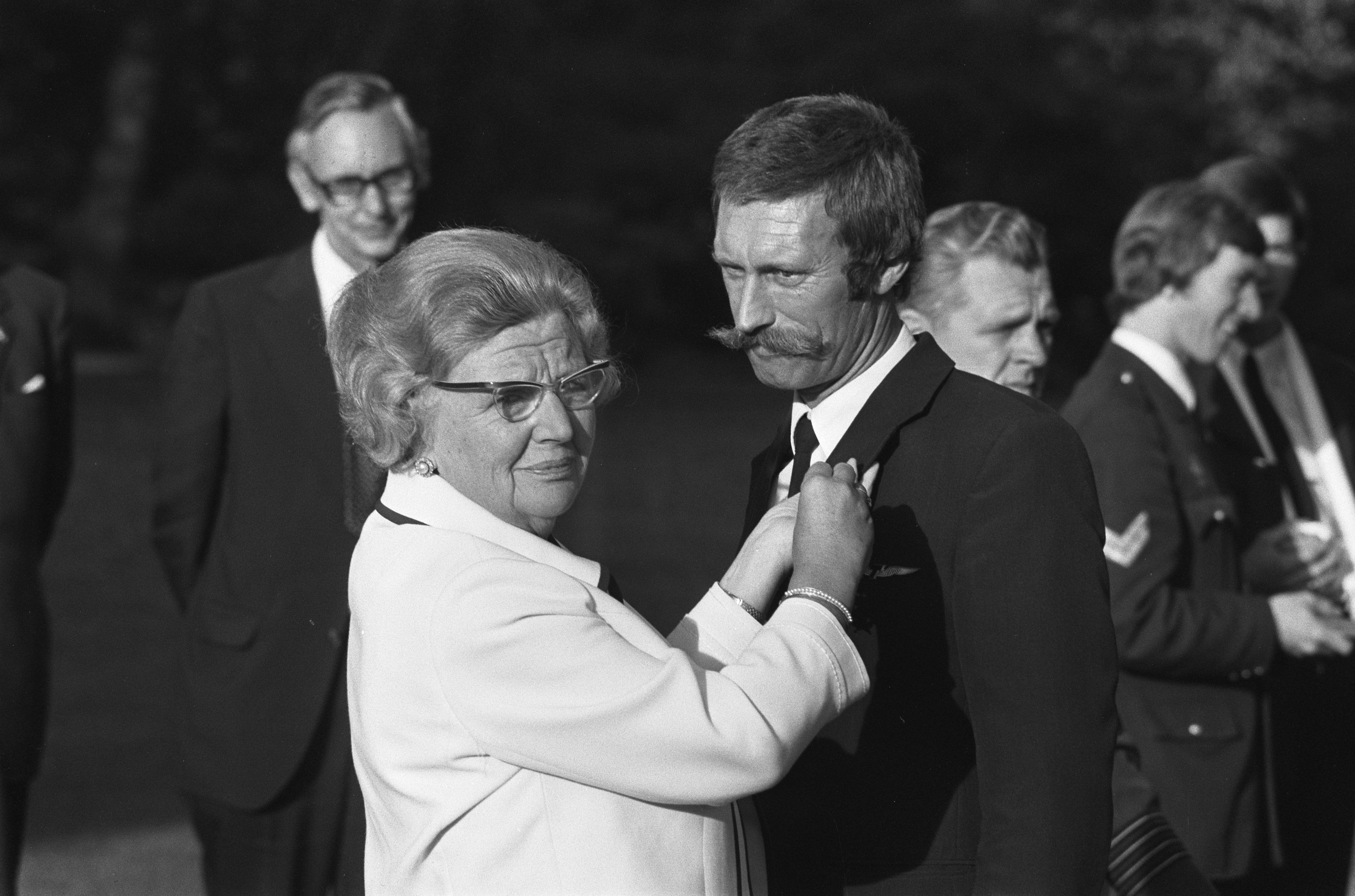 Collectie / Archief : Fotocollectie Anefo Reportage / Serie : [ onbekend ] Beschrijving : HM ontvangt allen die zich bij het gijzelingsdrama verdienstelijk hebben gemaakt op Huis ten Bosch ; Transavia captain Pim Sierks wordt door HM Datum : 19 september 1974 Trefwoorden : gijzelingen, onderscheidingen, ontvangsten Persoonsnaam : Huis Ten Bosch, Sierks, Pim Instellingsnaam : Transavia Fotograaf : Verhoeff, Bert / Anefo Auteursrechthebbende : Nationaal Archief Materiaalsoort : Negatief (zwart/wit) Nummer archiefinventaris : bekijk toegang 2.24.01.05 Bestanddeelnummer : 927-4612